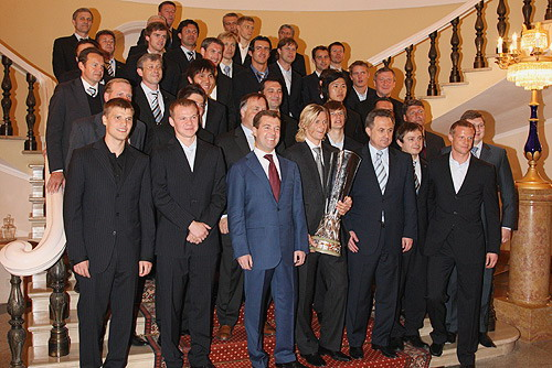 ФК "Зенит" на приеме у Президента России после победы в кубке УЕФА и